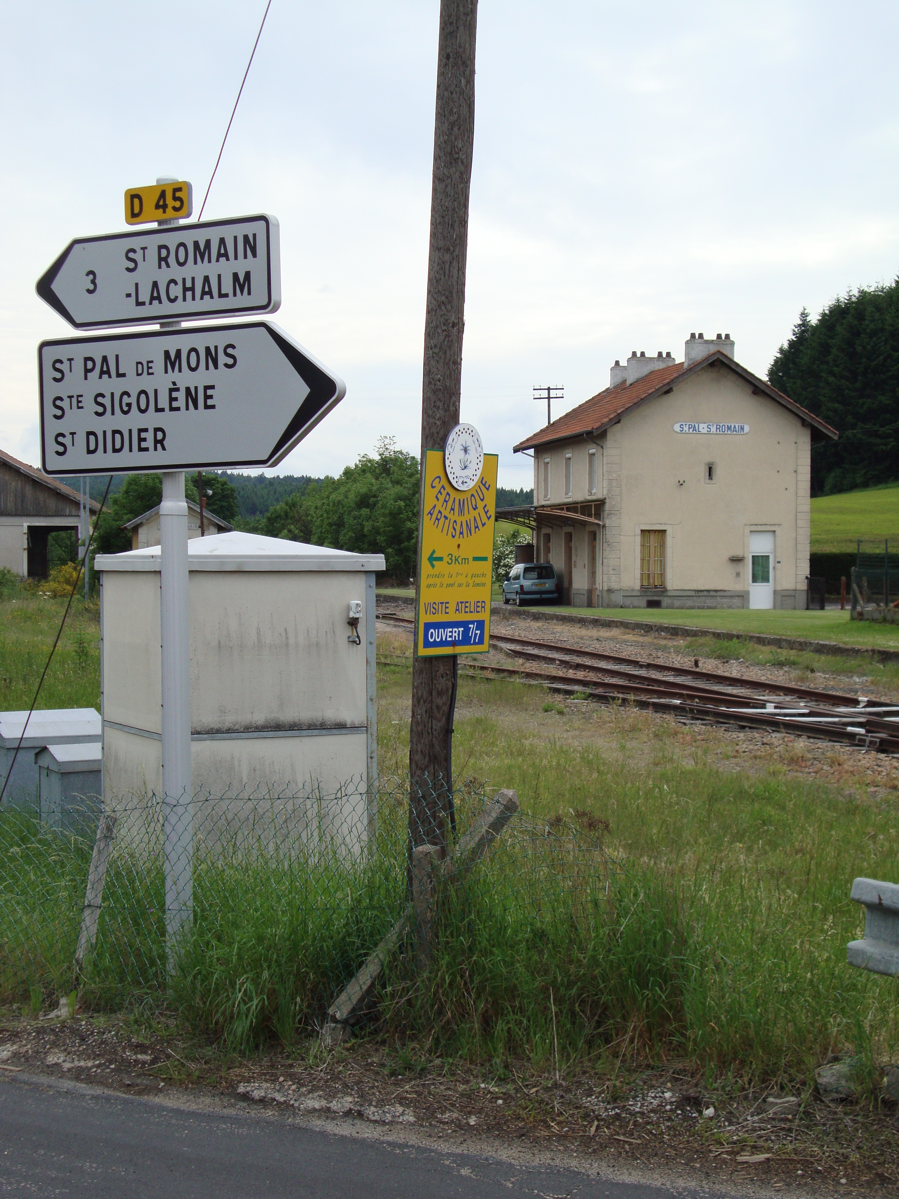 Gare St.Pal-de-Mons - St.Romain-Lachalm à Lichemialle (Haute-Loire, Fr)